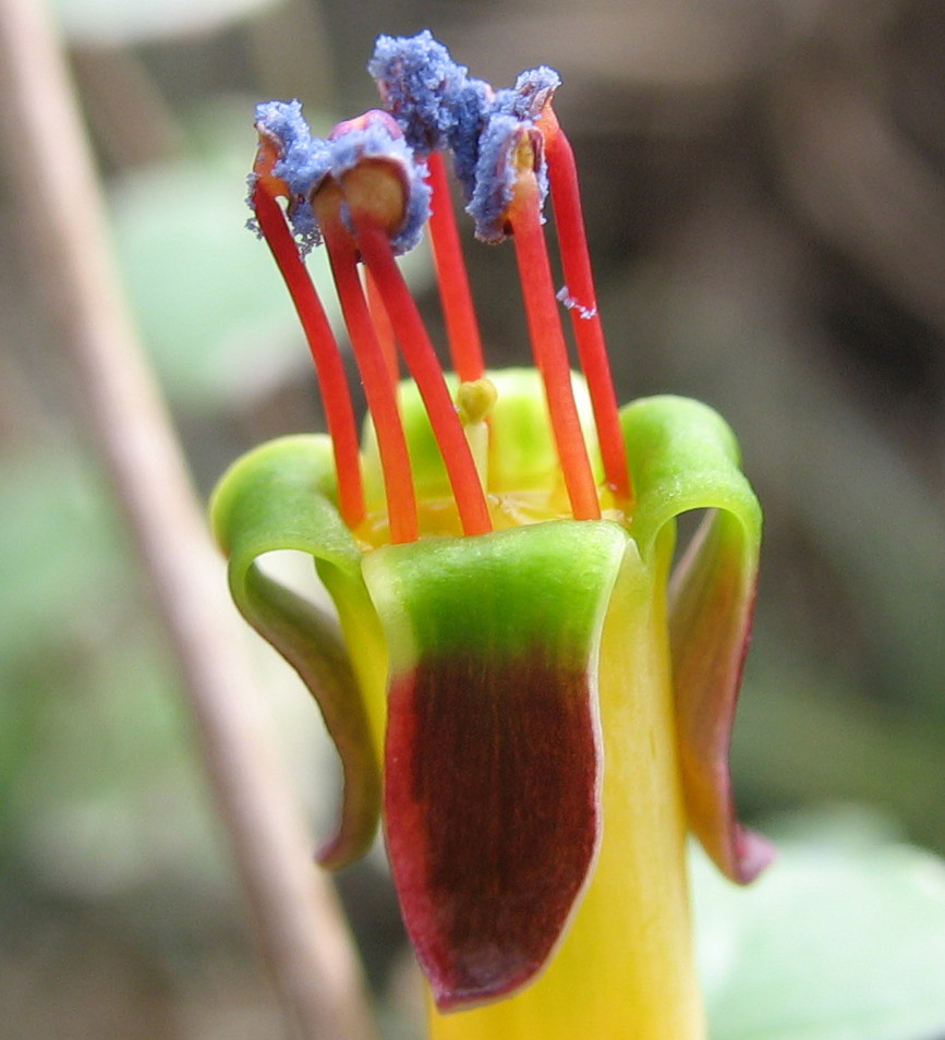 Die blauen Staubgefäße von Fuchsia procumbens cf. variegata selbst fotografiert - G. Schramayr - 2007-03-17